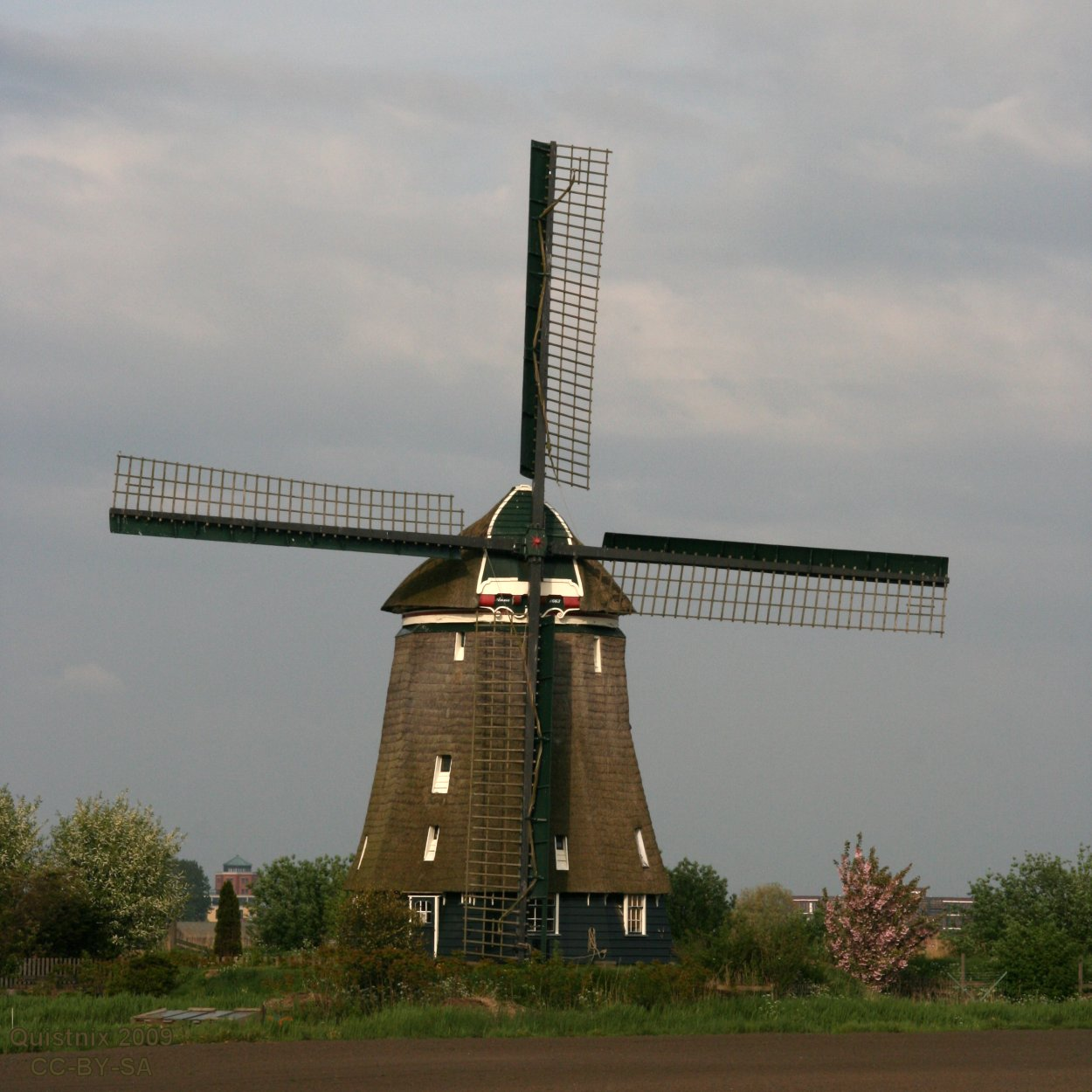 Sint Pancras: Molen A